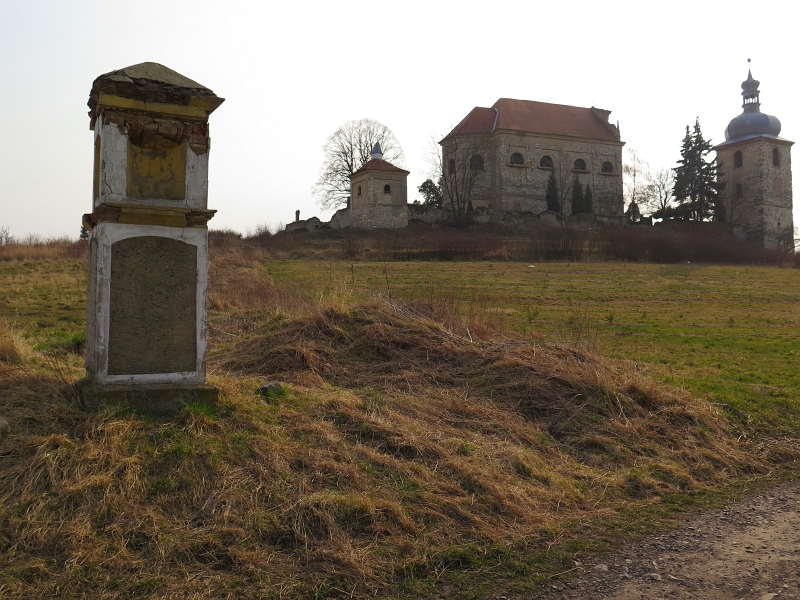 Boží muka, pp. 157, Zahořany (Křešice).